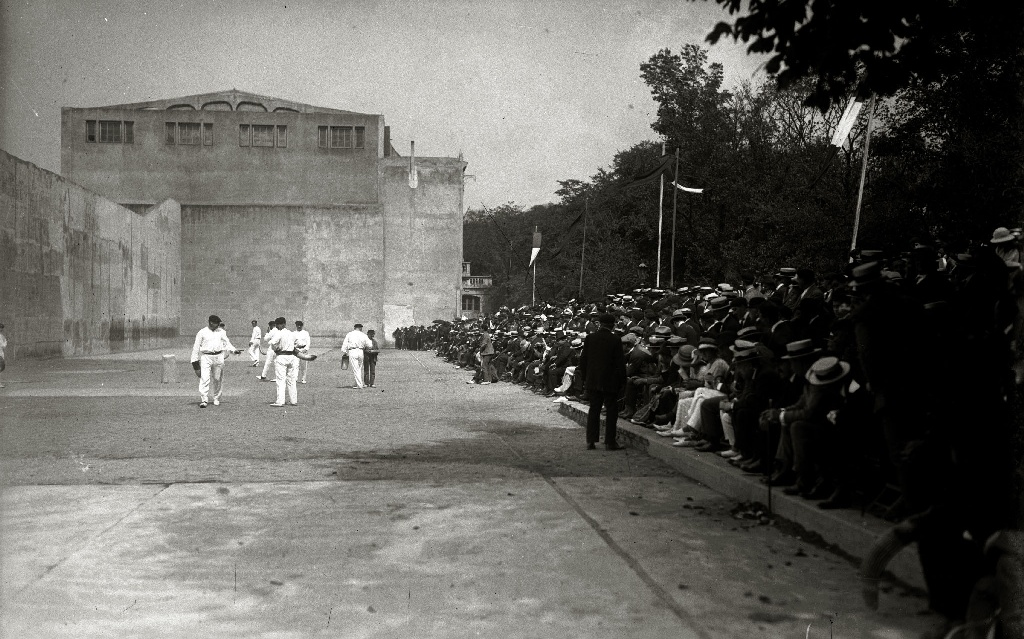 Título original: Partido de pelota a rebote entre España y Francia en el frontón del Duque de Mandas (1/4) Localización: San Sebastián (Guipúzcoa)